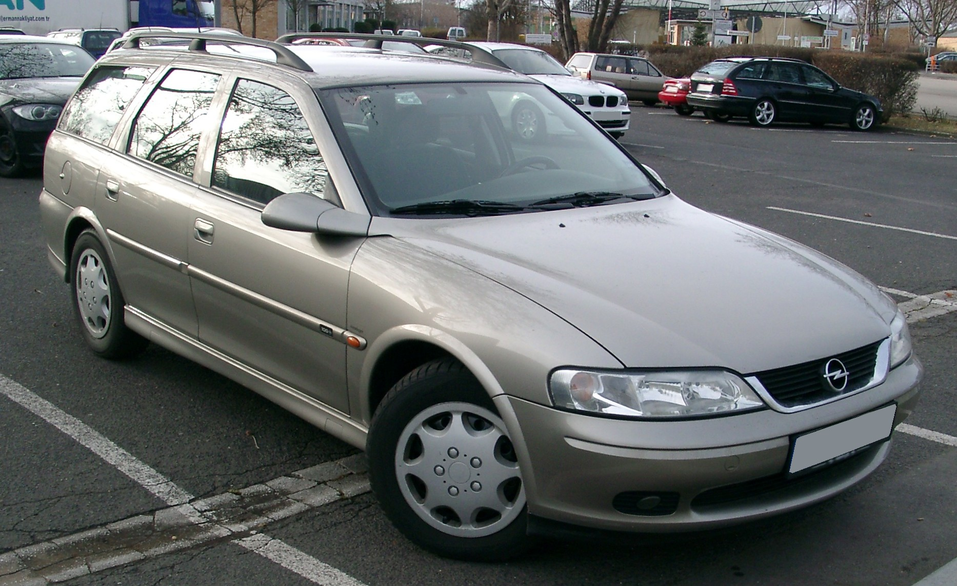 Opel Vectra B Kombi